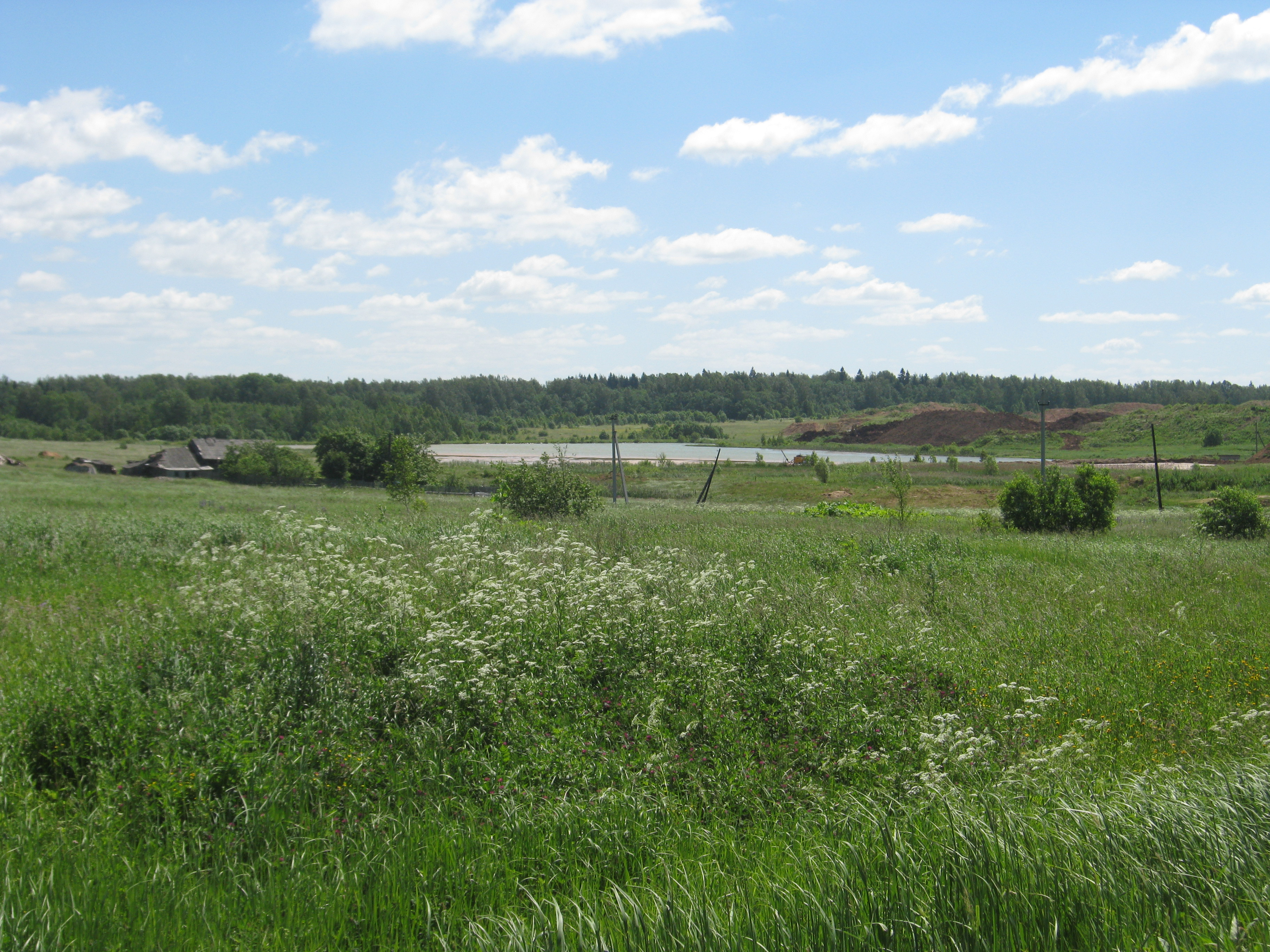 Вид на деревню Архангельское (Архань) Шаховского района Московской области